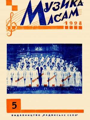 Музыка массам — украинский музыкальный журнал (1928)